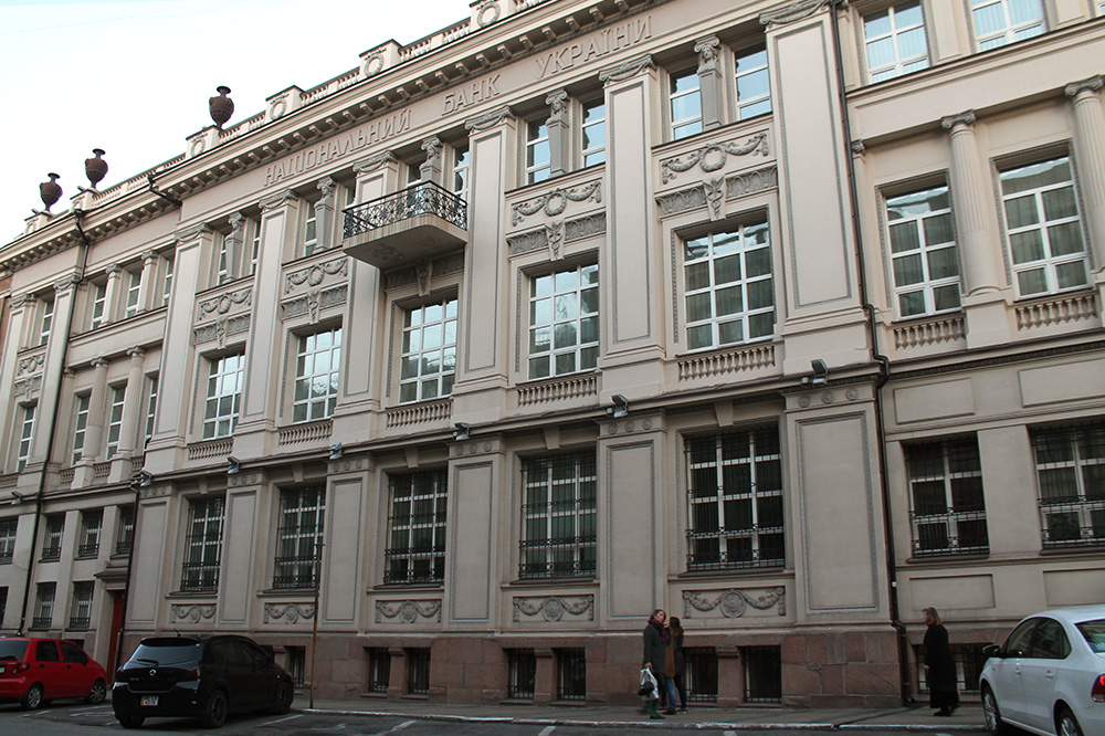 Філія Національного банку України у Дніпропетровській області.